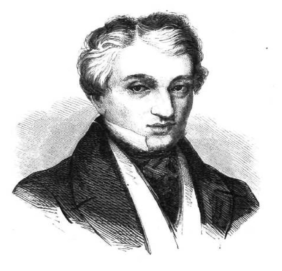 Griechischer Dichter, 19. Jahrhundert